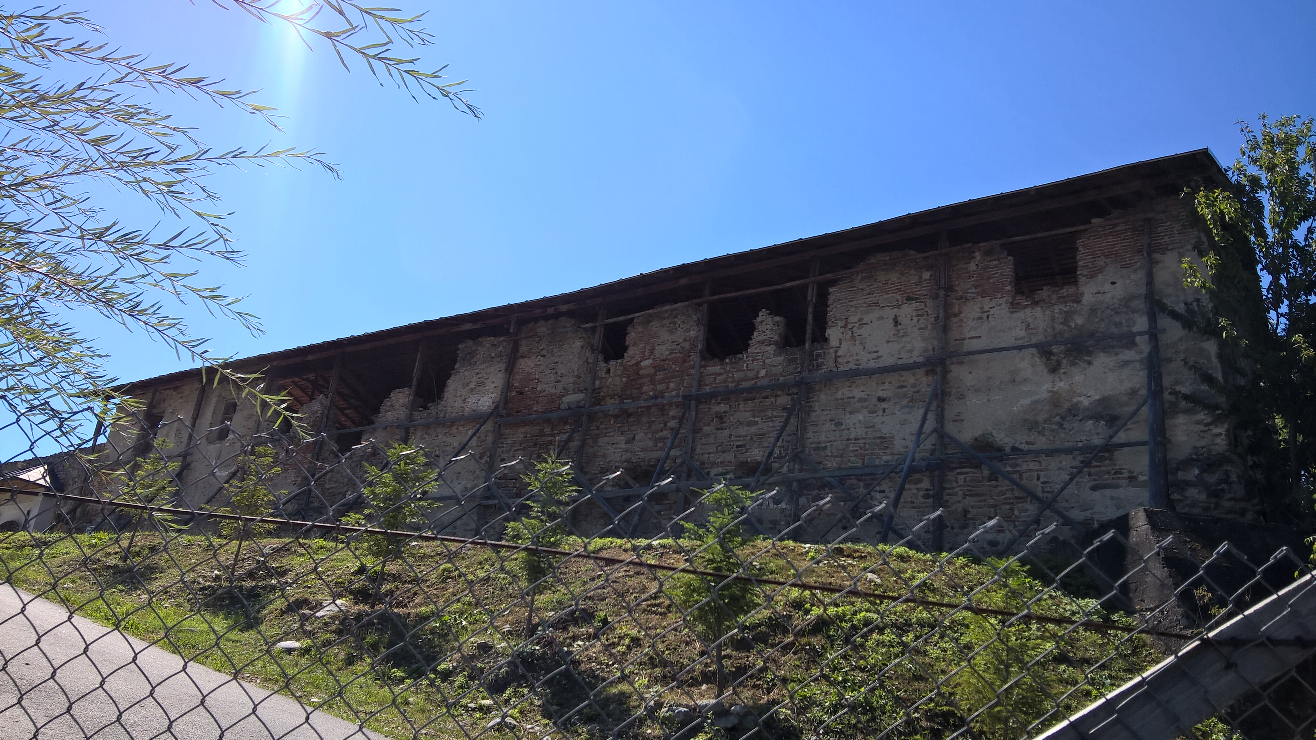 Fosta mănăstire Berislăvești, Ruinele stăreției 02